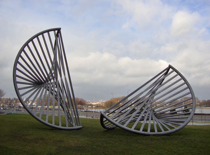 Tytuł: Transmutatio, wys. 800cm, materiał: stal nierdzewna